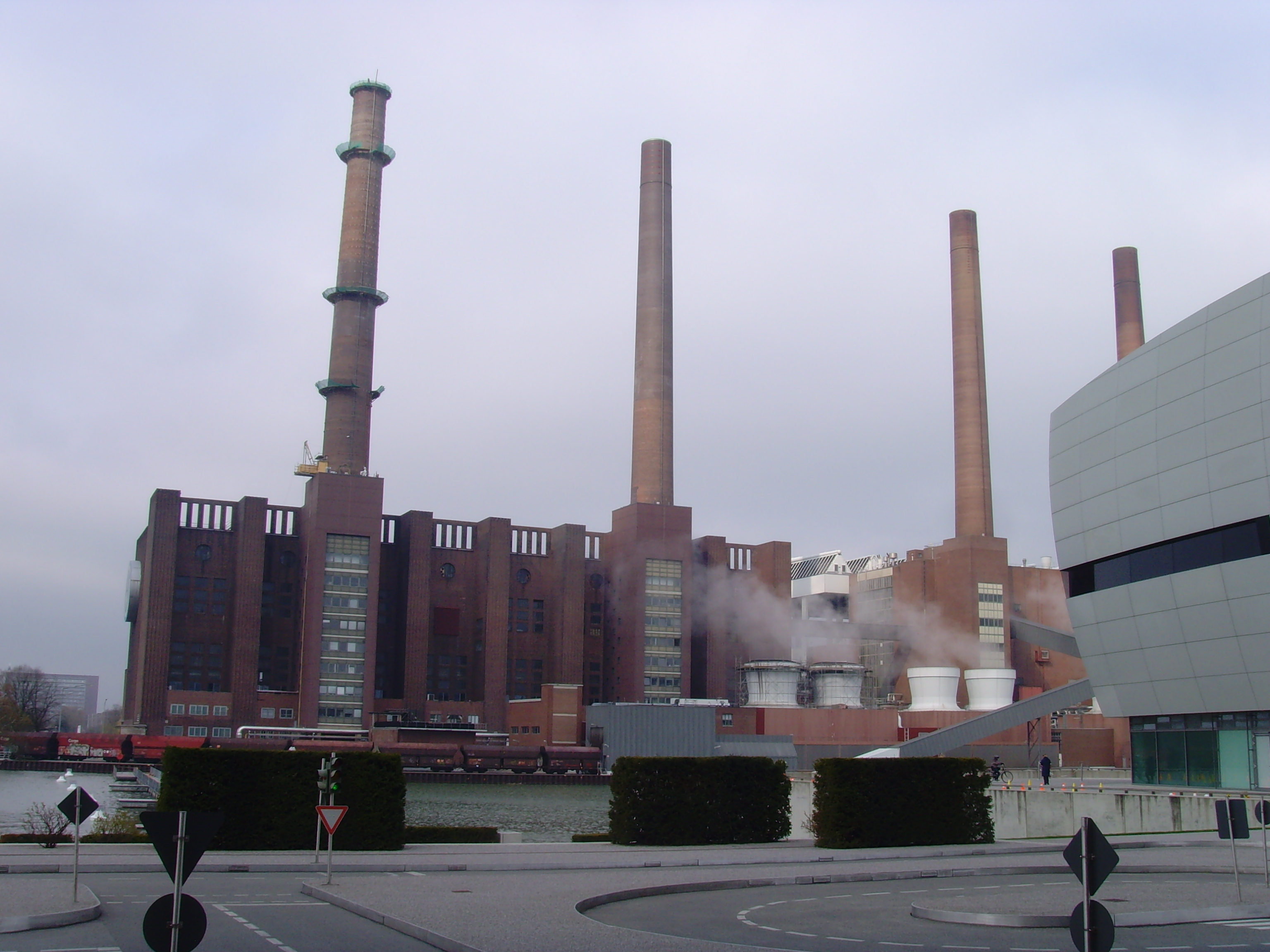 Autostadt Wolfsburg - Volkswagen-Werk 1